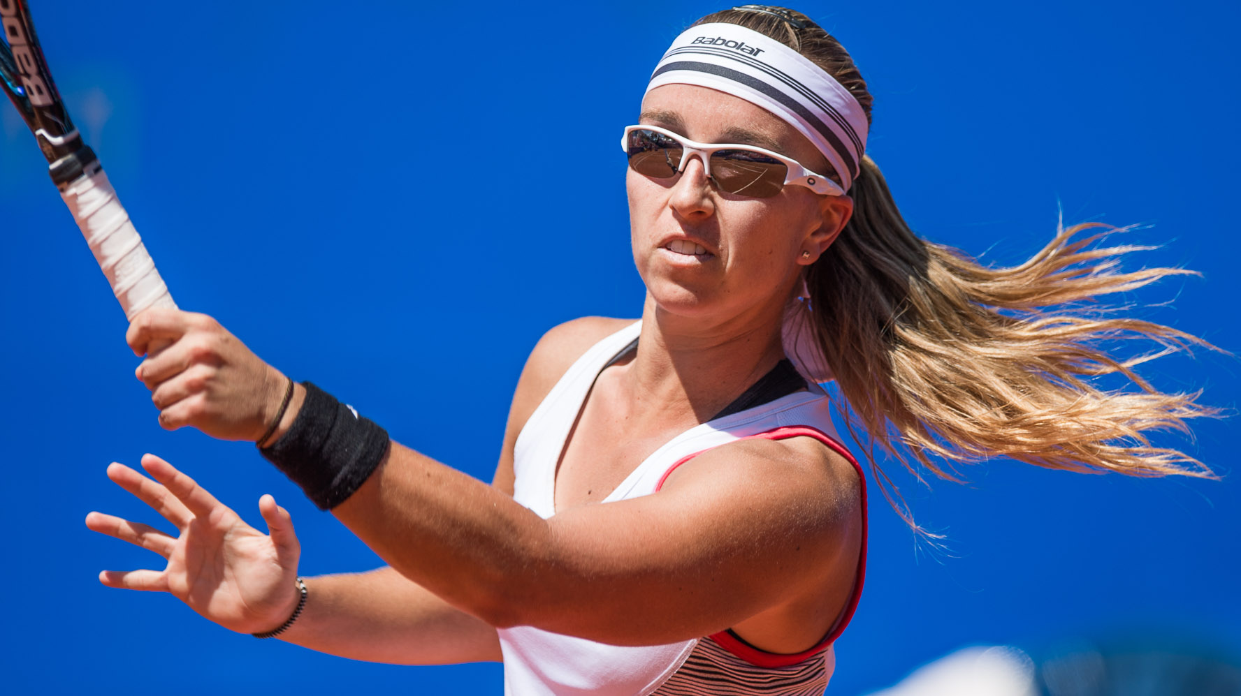 Beatriz Garcia Vidagany,Beatriz García Vidagany,Damentennis,Nürnberger Versicherungscup 2014,Tennis,WTA